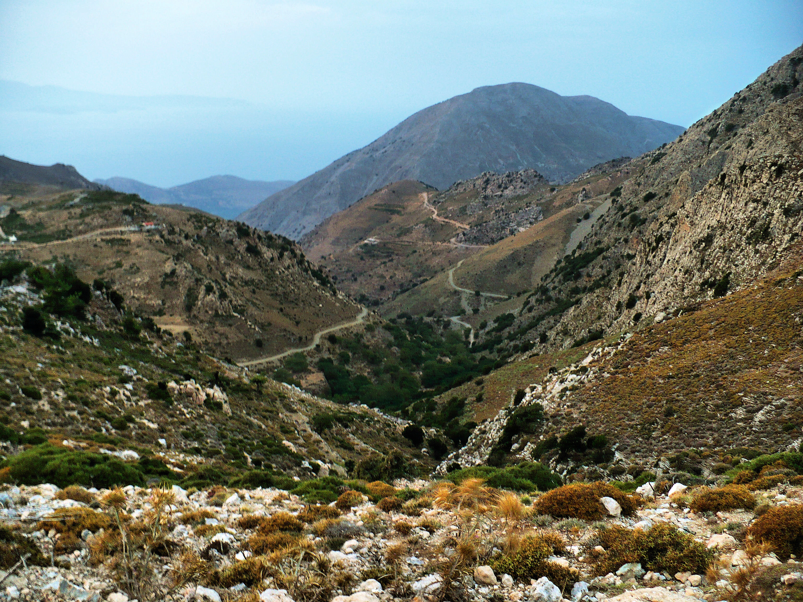 droga w górach w okolicy Tsamantis